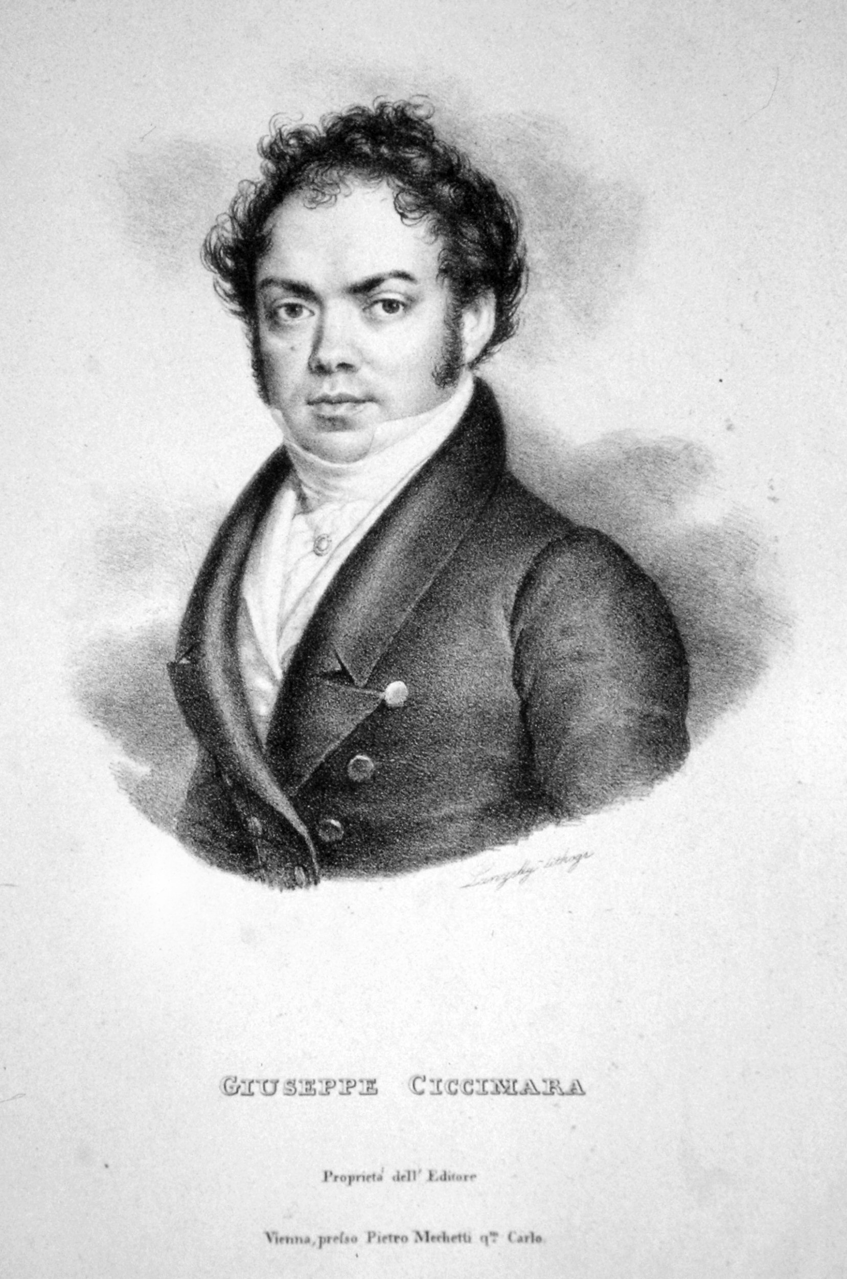 Giuseppe Ciccimara (1790-1836), italienischer Opernsänger (Tenor), Gesangspädagoge. Lithographie von Josef Lanzedelli d. Ä., ca. 1820